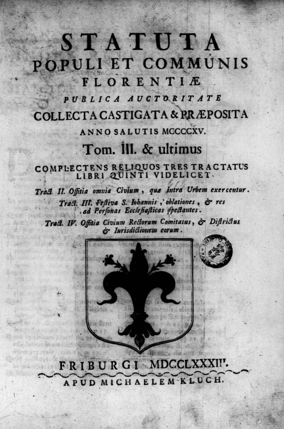 Frontespizio